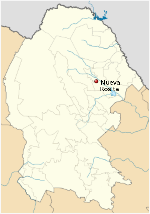 Ubicación aproximada de la región «Nueva Rosita» en Coahuila